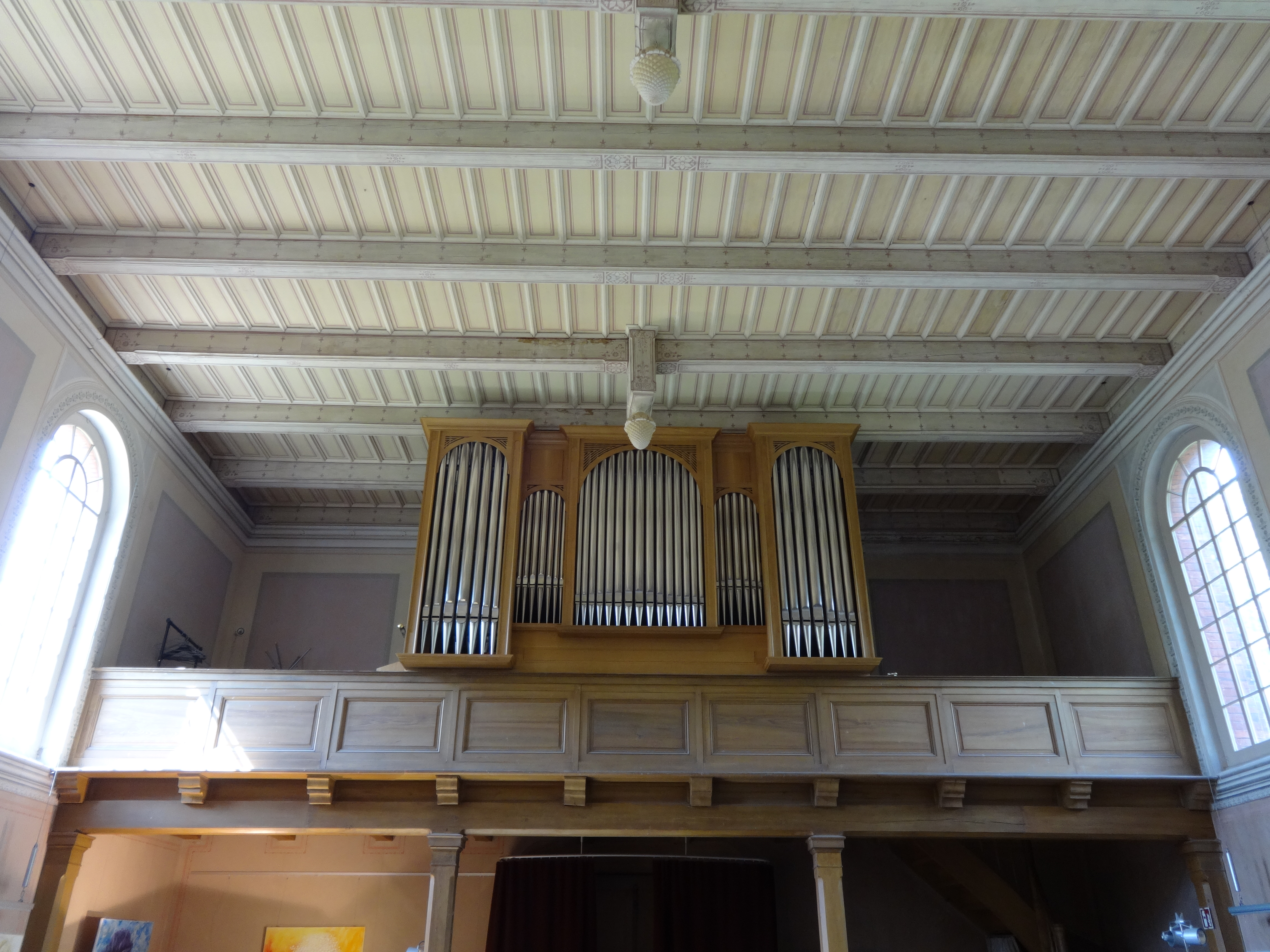 Die Dorfkirche Petzow ist ein ehemaliger, neuromanischer Sakralbau, der in den Jahren 1841 und 1842 nach einem Entwurf von Karl Friedrich Schinkel errichtet wurde. Nach seinen Entwürfen fertigten Handwerker auch den schlichten und hölzernen Altar mit einem Kruzifix aus Gußeisen, die Kanzel sowie eine Fünte aus Eichenholz an. 1988 entwidmet und für 99 Jahre an das Landratsamt verpachtet dient sie seit 1994 dem Landkreis als Veranstaltungsort für Konzerte, Ausstellungen sowie als Standesamt.